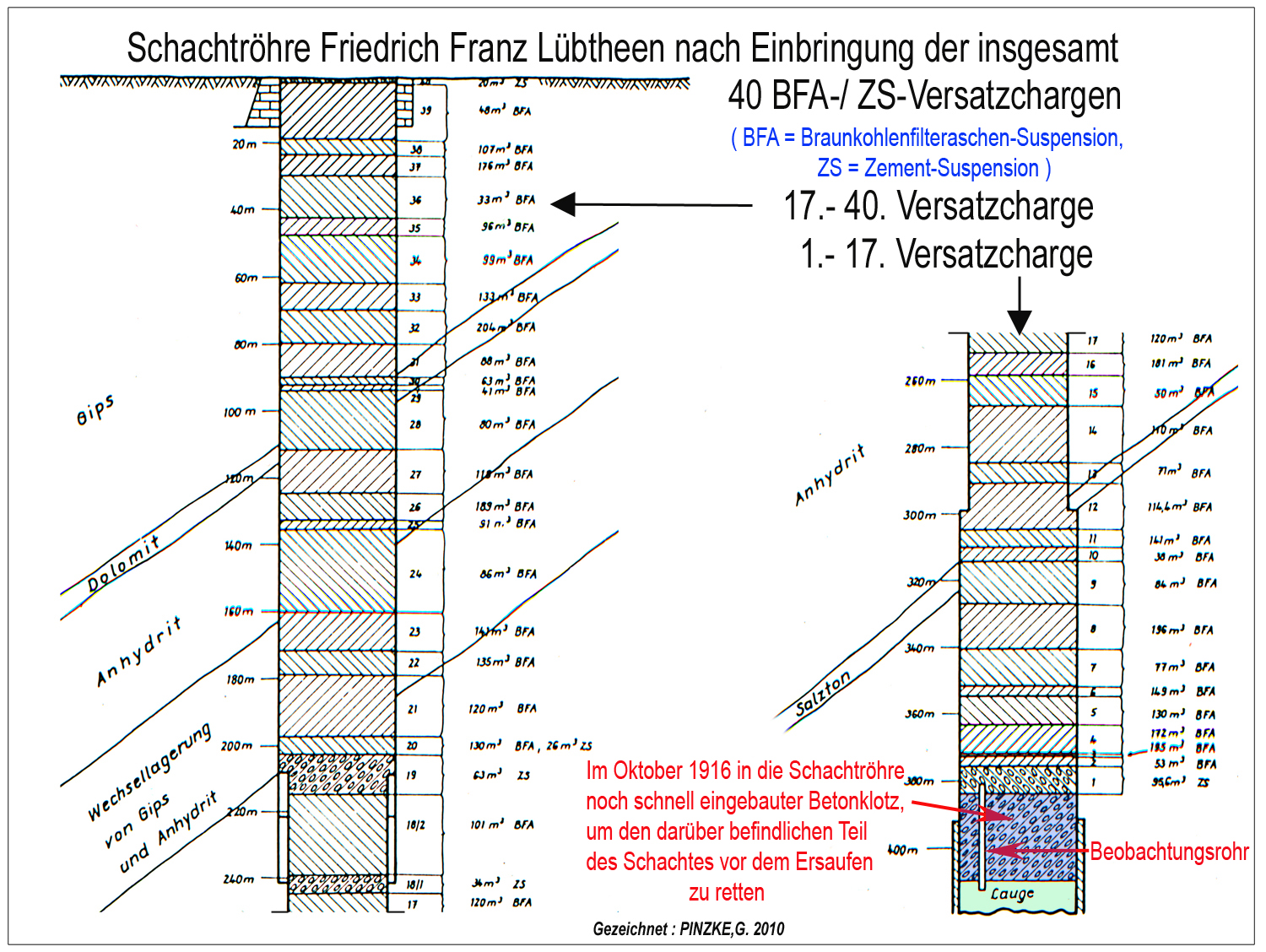 Lübtheen, Schnitt durch die Schachtröhre nach deren Verfüllung 1980 mittels BFA/ZS